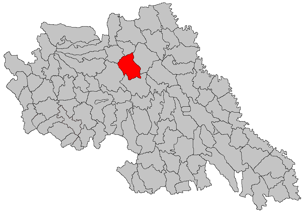 Categorie:Hărţi ale judeţului Iaşi